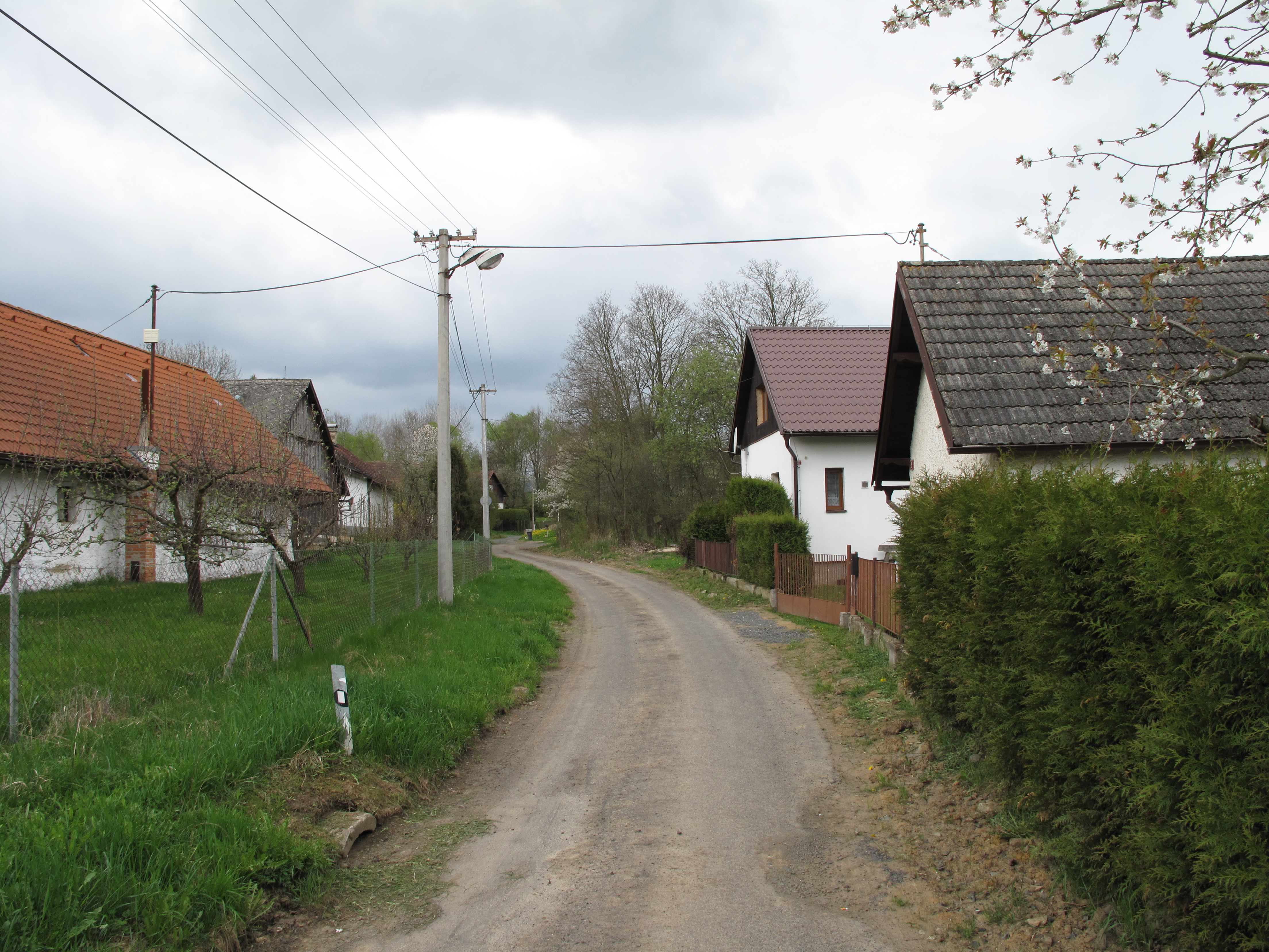 Mlýnec (Poleň). Okres Klatovy, Česká republika.